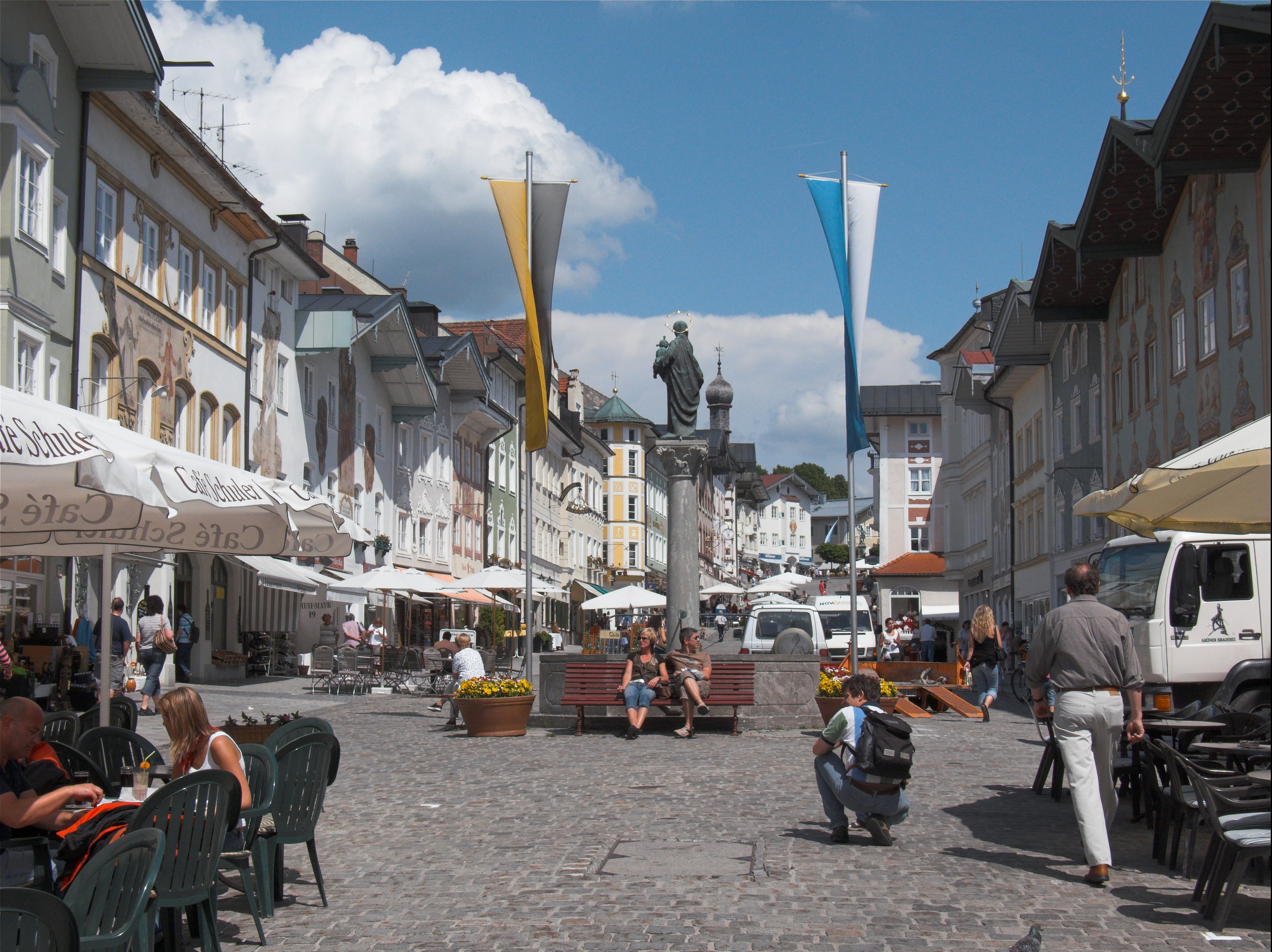 Fußgängerzone von Bad Tölz